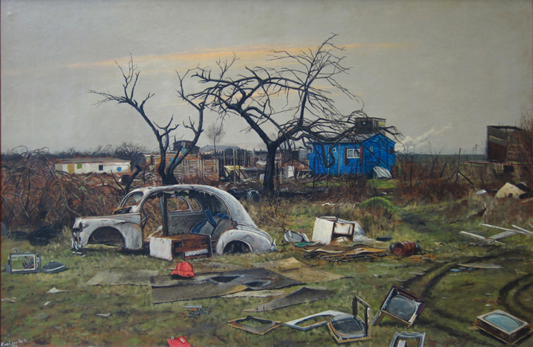 Jürg Kreienbühl, La zone, 1972, Dispersion auf Hartfaserplatte, 90 x 122 cm (Privatbesitz)